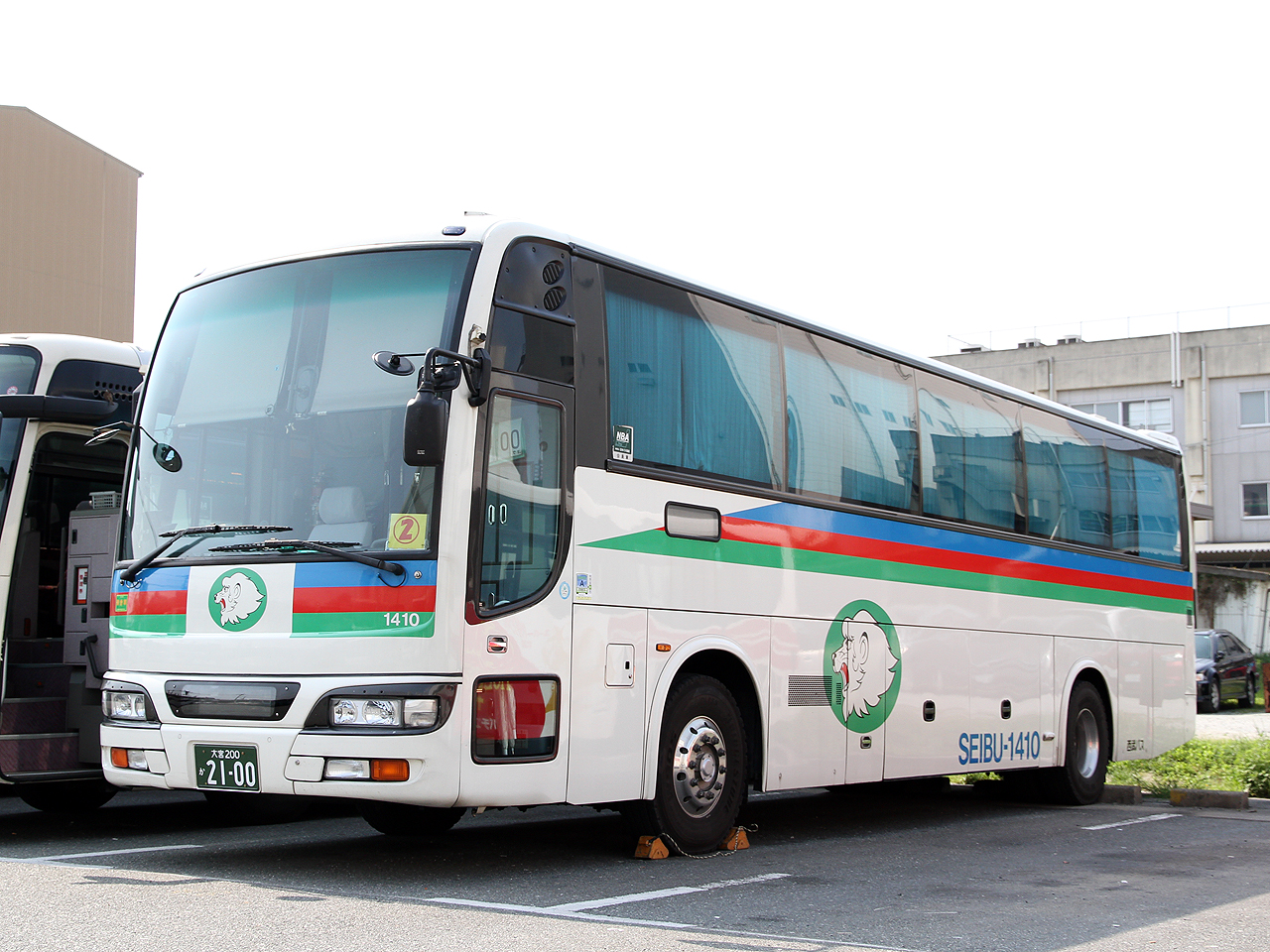 登録番号 大宮200か21-00 西武観光バス㈱大宮営業所所属 高速路線用車両 2012年5月 福岡市内にて撮影 撮影者 Zondag2000